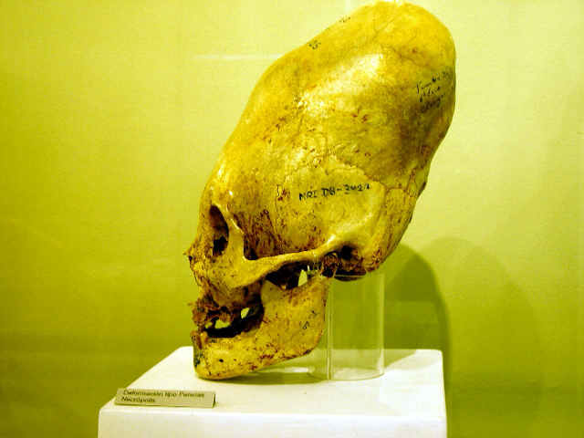 Crâne déformé pour des raisons esthétiques. Musée de Nasca.